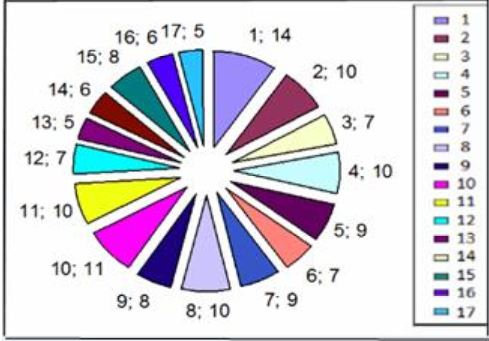 qrafik